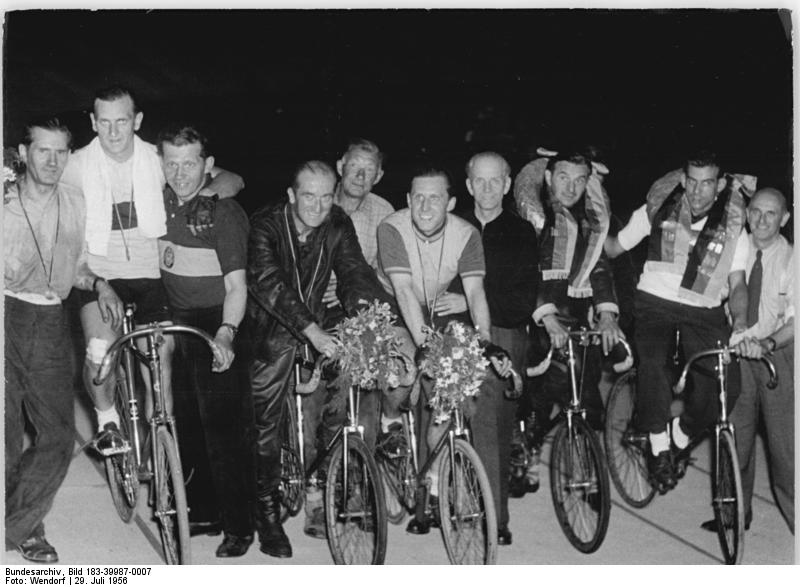 Rudi Keil, Erich Stammer, Bruno Zieger Zentralbild Wendorf 29.7.1956 Bey-Ka. DDR-Meisterschaften im Radsport Am Sonnabend, dem 28.7.1956, wurden auf der Radrennbahn in Berlin Weissensee die DDR-Meisterschaften im Bahnfahren fortgesetzt. Den Titel im Dauerfahren holte sich der Favorit Bruno Zieger (Post Berlin) vor Stammer und Keil. Im 1000-m-Malfahren sicherte sich der Titelverteidiger Jürgen Simon (Einheit Berlin) vor Stäber (Dynamo Berlin) erneut die Meisterschaft. UBz:Die drei Erstplazierten im Dauerfahren über 75 km. V:l.n.r. Rudi Keil, (3. Platz) Erich Stammer (2. Platz) und der neue DDR-Meister Bruno Zieger während der Siegerehrung.